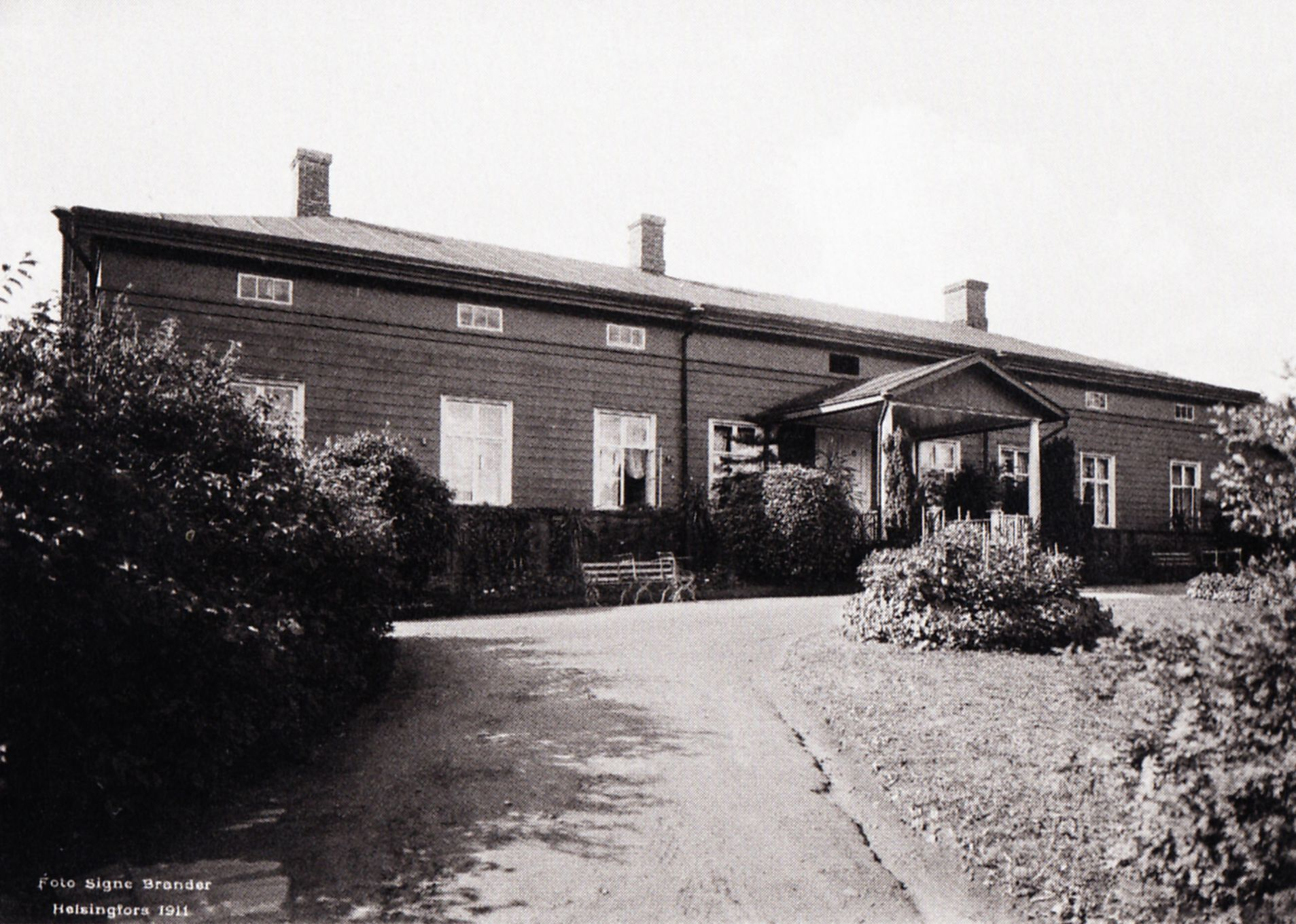 Laukon kartano